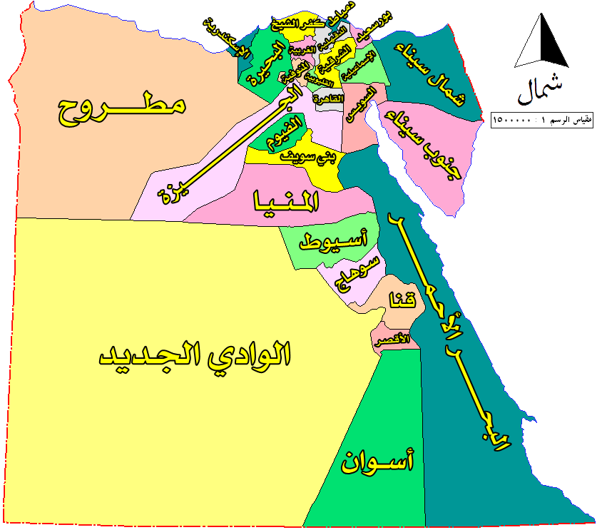 محافظات مصر، تقسيم 2011